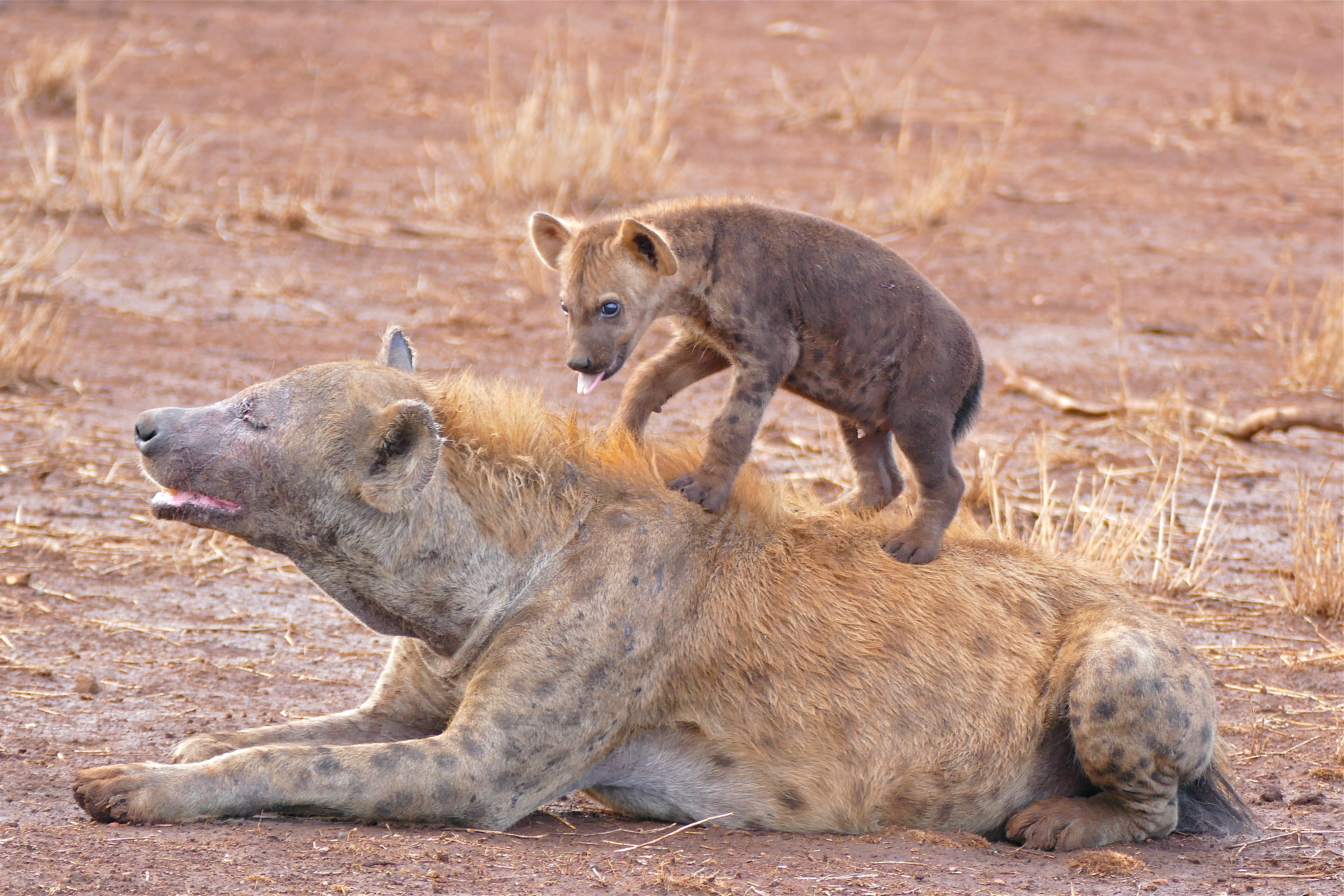 H6 Road East of Satara, Kruger NP, Mpumalanga, SOUTH AFRICA